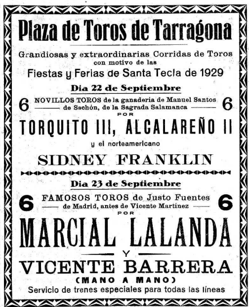 Cartel anunciando la corrida de toros celebrada en la Plaza de toros de Tarragona el 22 de septiembre de 1929, donde participaron Torquito III, Alcalareño II y el estadounidense Sidney Franklin